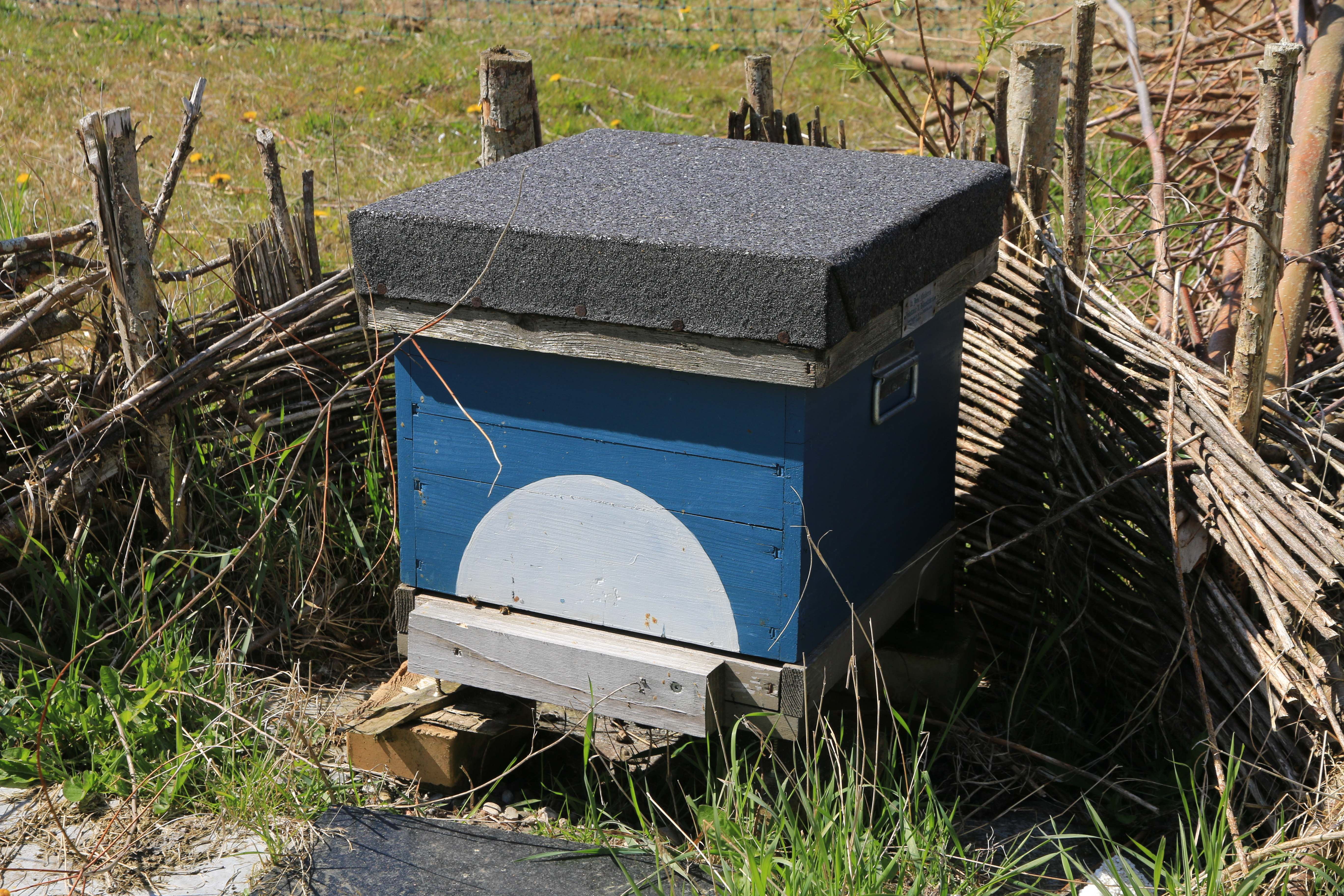 Bikube - - Dyssekilde økolandsby ecovillage Denmark